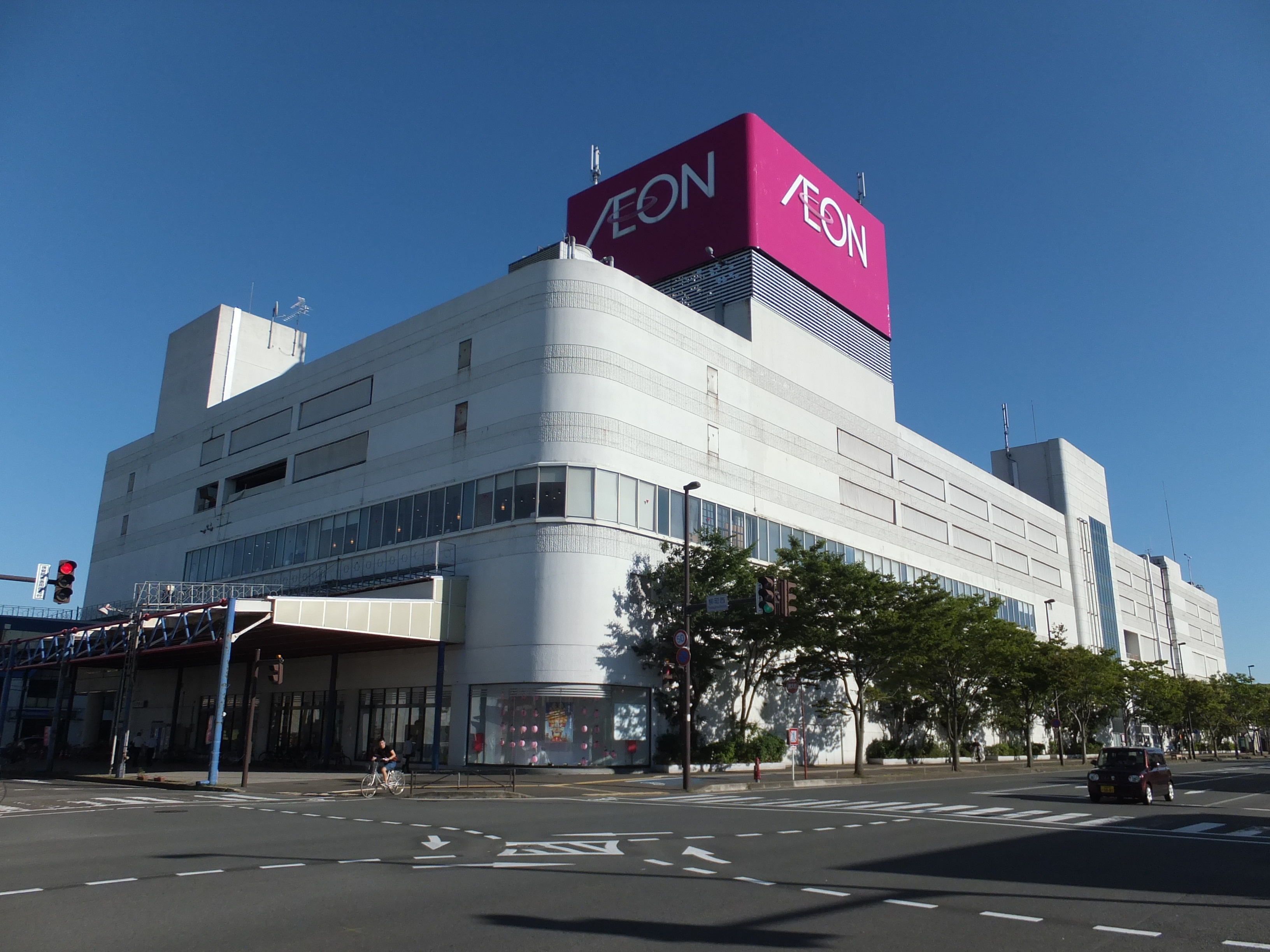 能代ショッピングセンター（イオン能代店）。能代市中心部の柳町に位置し、山本組合総合病院跡地と羽後銀行（北都銀行の前身）能代支店周辺を一体的に再開発して1990年に開業した。この経緯から施設はイオンリテールと北都銀行がそれぞれ区分所有しており、北都銀行能代支店が入る（※インストアブランチとは異なる）。